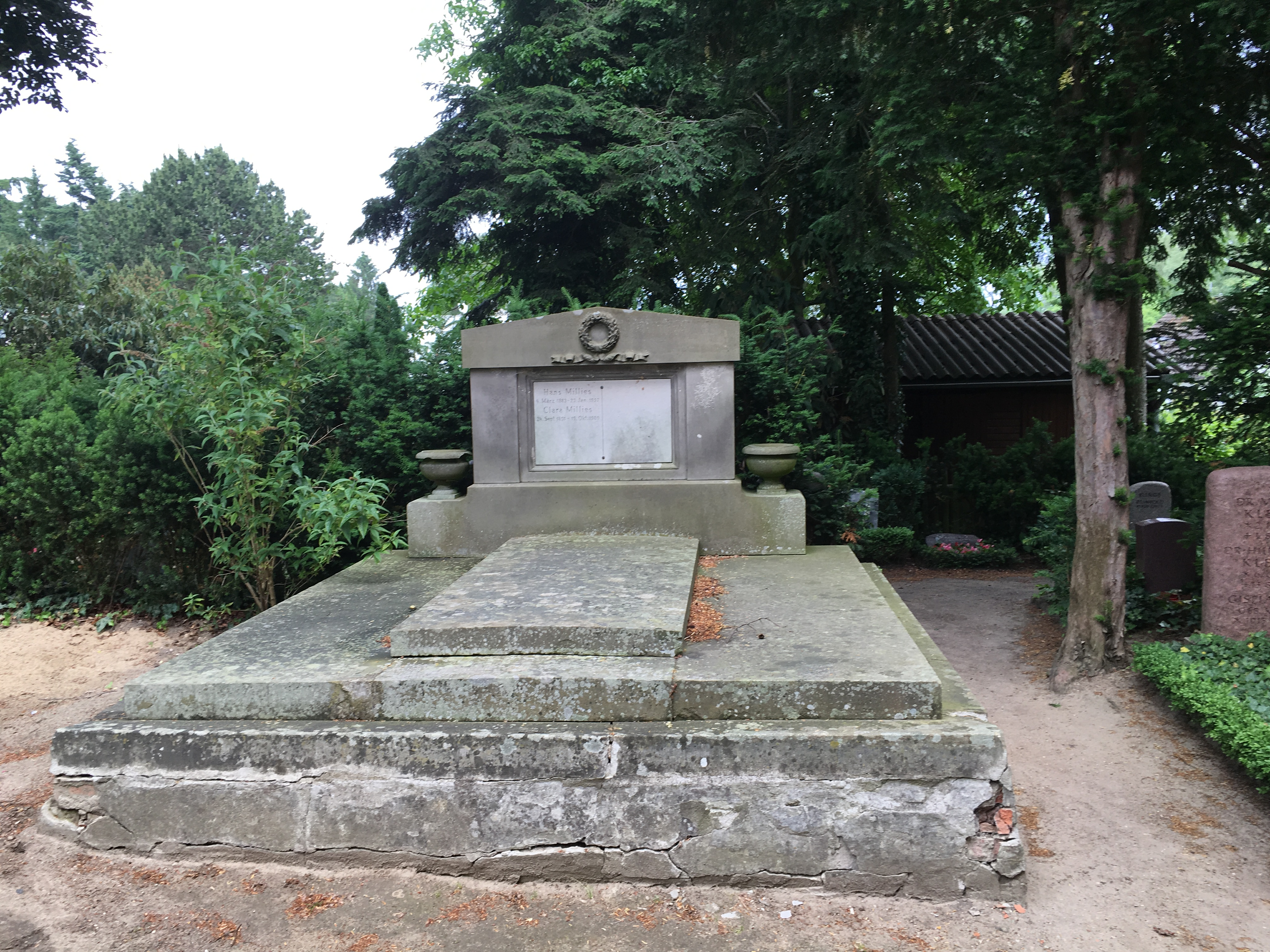 St. Jürgen (Lübeck) Grab